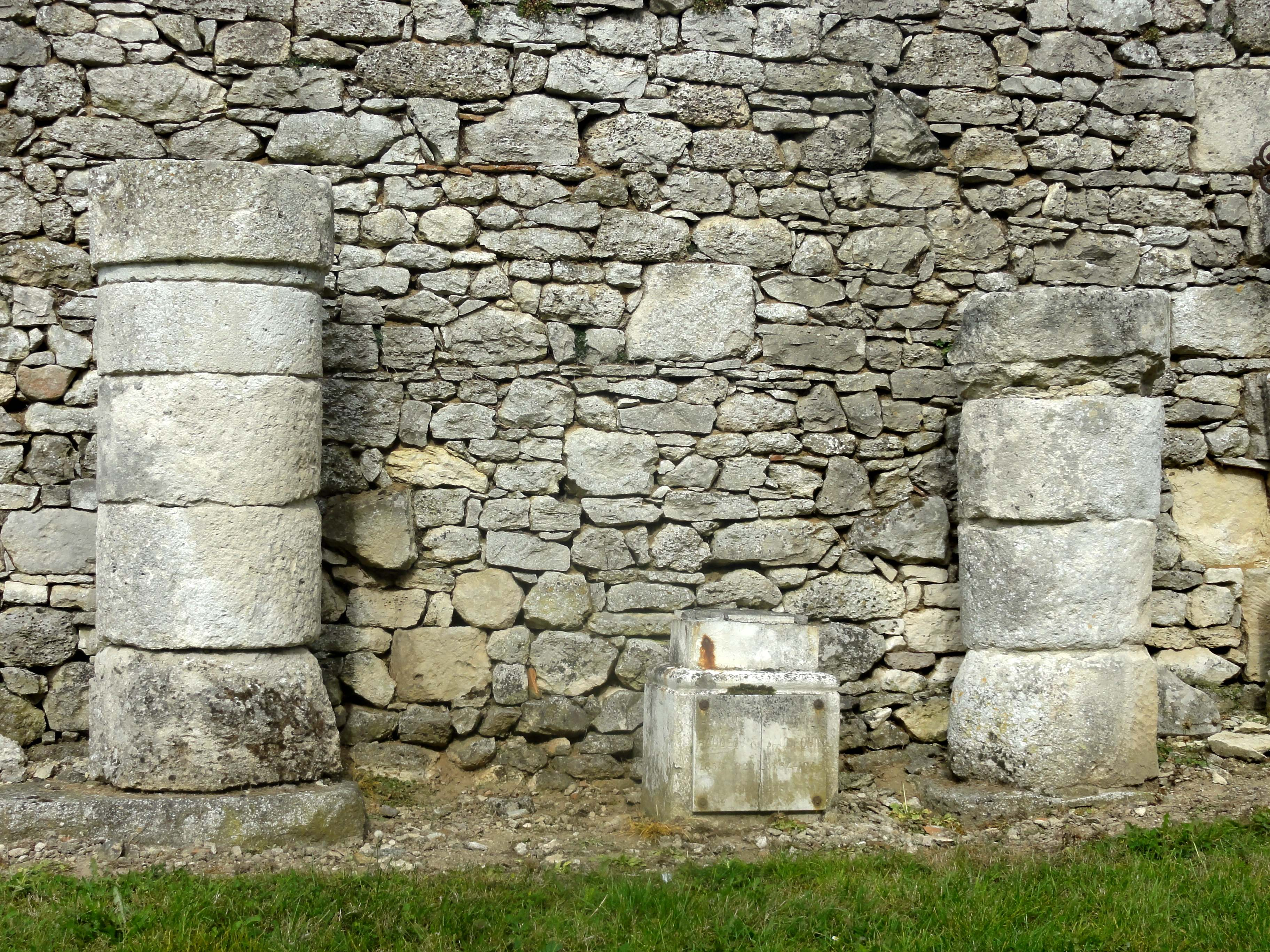 Anciens piliers du porche.